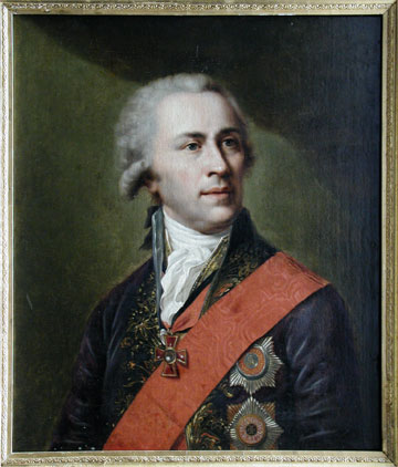 Неизвестный художник. А. И. Мусин-Пушкин. Конец XVIII в.